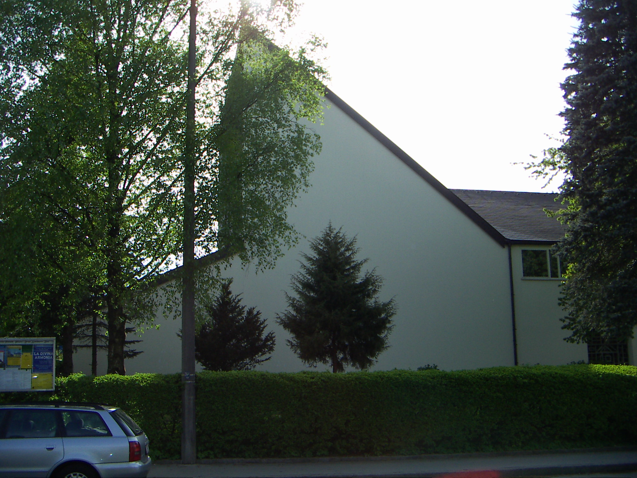 Parscher Pfarrkirche Zum Kostbaren Blut, Seitenansicht, aufgestelltes Pultdach über Satteldach über dem Altarraum